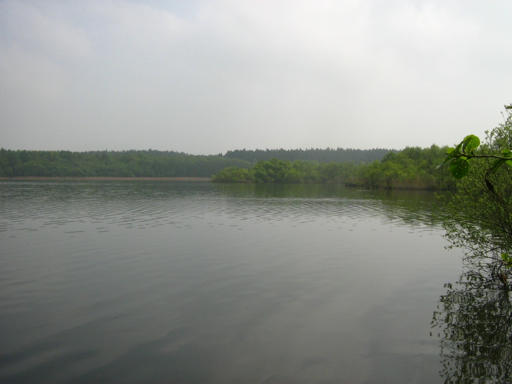 Der Döpe See im NSG Döpe östlich des Nordendes des Schweriner Sees in der Gemeinde Ventschow im Landkreis Nordwestmecklenburg. Blick vom Nordufer gegen das Ostufer des Sees.